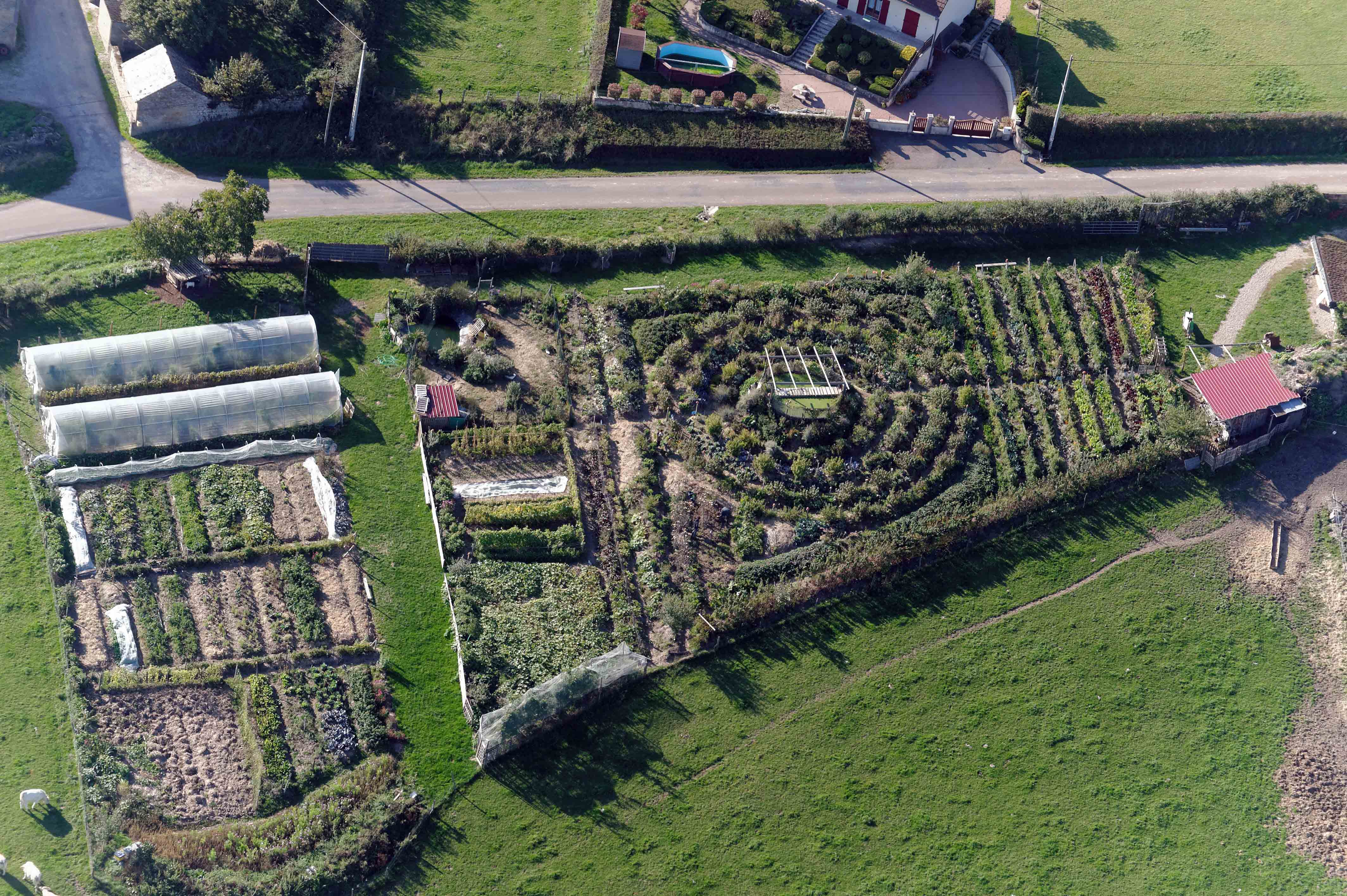 Depuis 2012 afin de sensibiliser le grand public à la protection de l'environnement, l'association Alôsnys développe un jardin bio pour donner le goût aux plus jeunes de prendre soin d'une plante, d'un animal ou d'un jardin.